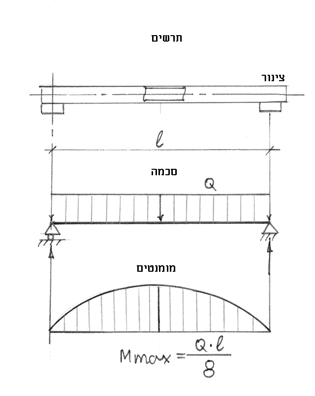 דוגמה למומנט כפיפה בצינור תמוך.